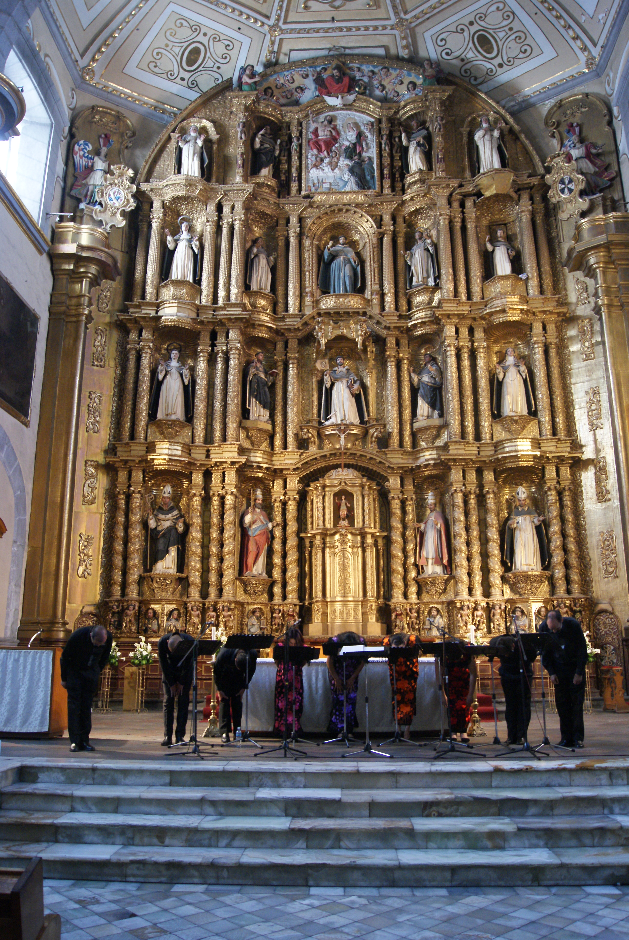 La Capilla Virreinal de la Nueva España, dirigida por Aurelio Tello, en el Templo de Santo Domingo, Puebla. Este concierto ocurrió en el marco del Festival Barroquísimo de 2010.